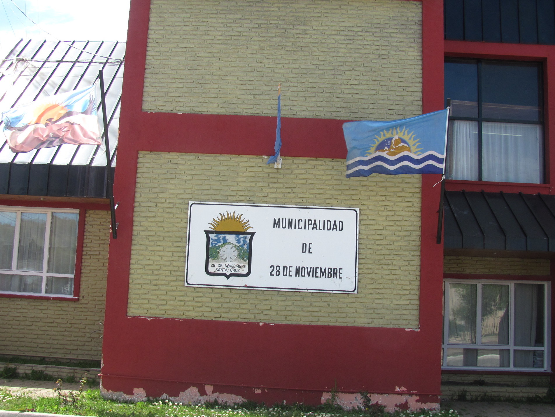 Municipalidad de 28 de Noviembre